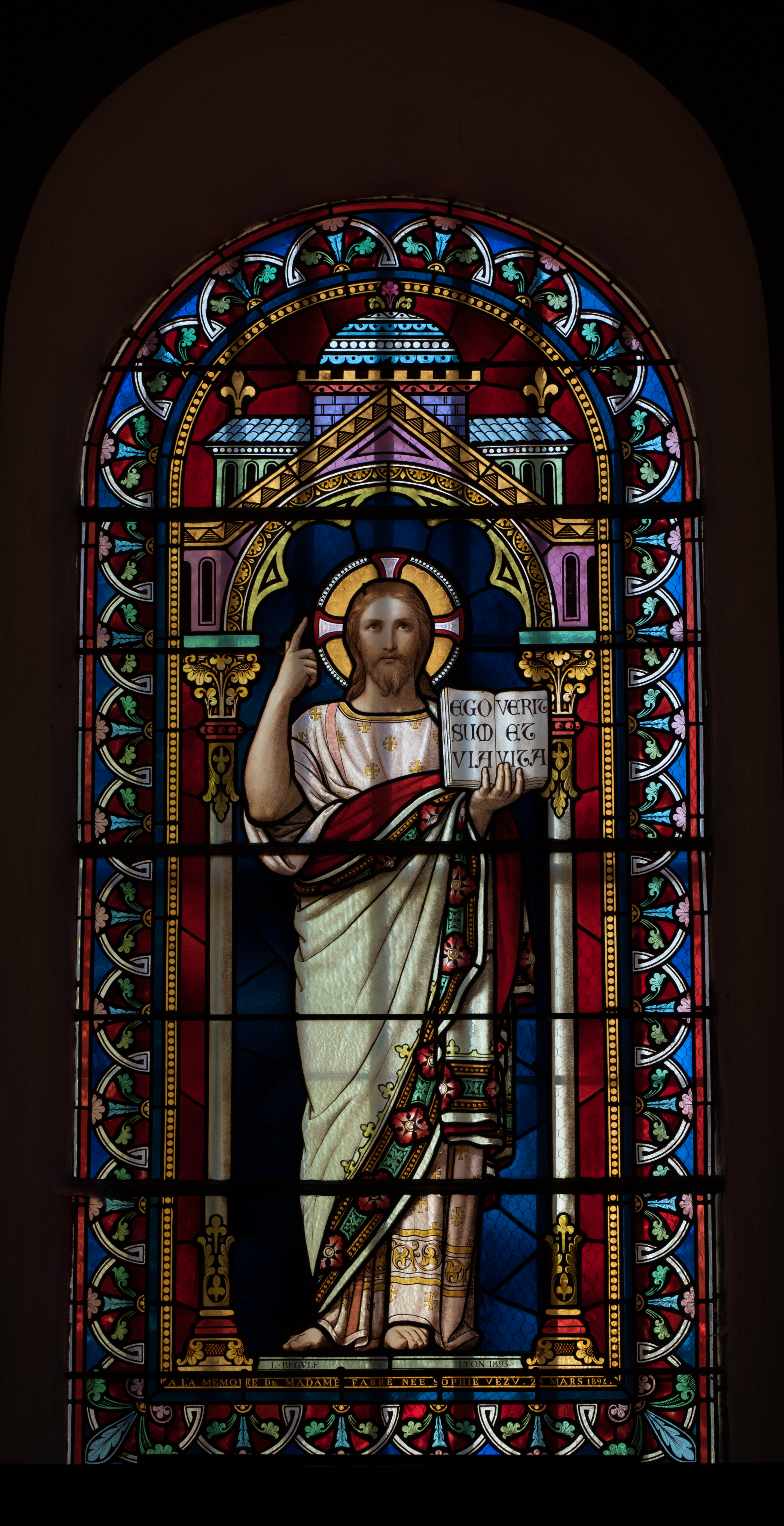 Vitrail central du choeur de l'église Saint-Martin de Salles-Arbuissonnas-en-Beaujolais - Christ en gloire - Realise par Begule en 1893